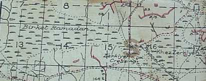 אגן הפולג בקטע ממפה בריטית ממלחמת העולם הראשונה (אוגוסט 1918) של אזור השרון בקנ"מ 1:40,000 (גיליון Tirah). התצלום לקוח מסריקה אותה ביצע מעלה הקובץ (המשתמש רועים) ומכאן אין חשש להפרת זכויות יוצרים, שכן המעלה הוא גם בעל הזכויות.